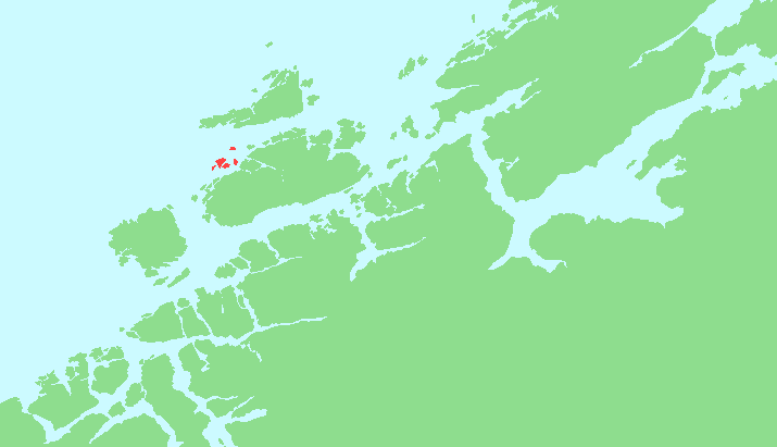 Locator map of Bispøya, Sør-Trøndelag, Norway